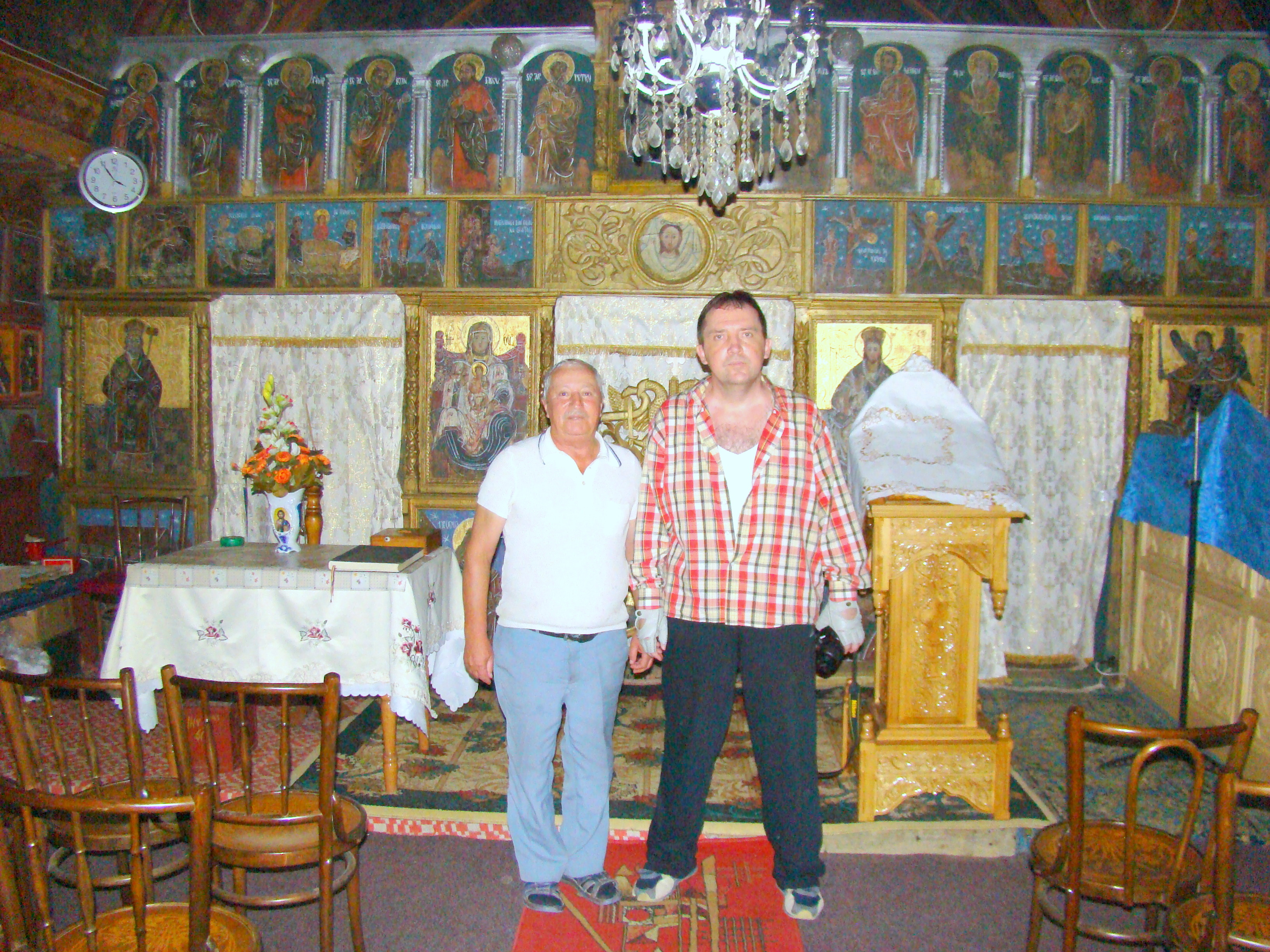 Biserica de lemn „Sfinții Arhangheli” din Năsal